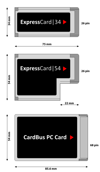 Ekspresskaardi tüübid võrdlusena CardBus kaardiga